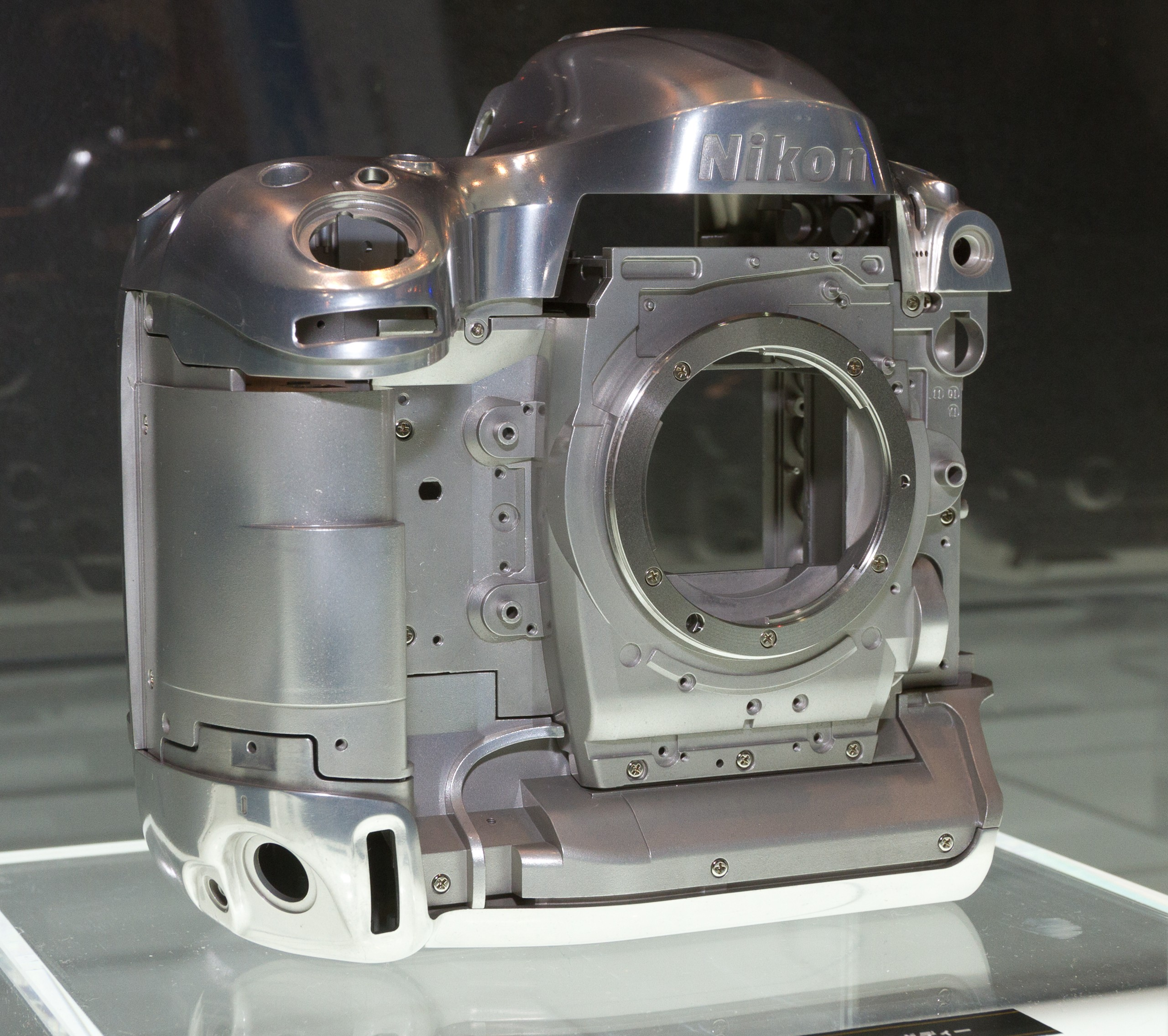 CP+ 2012: 2012 Nikon D4 magnesium-alloy frame